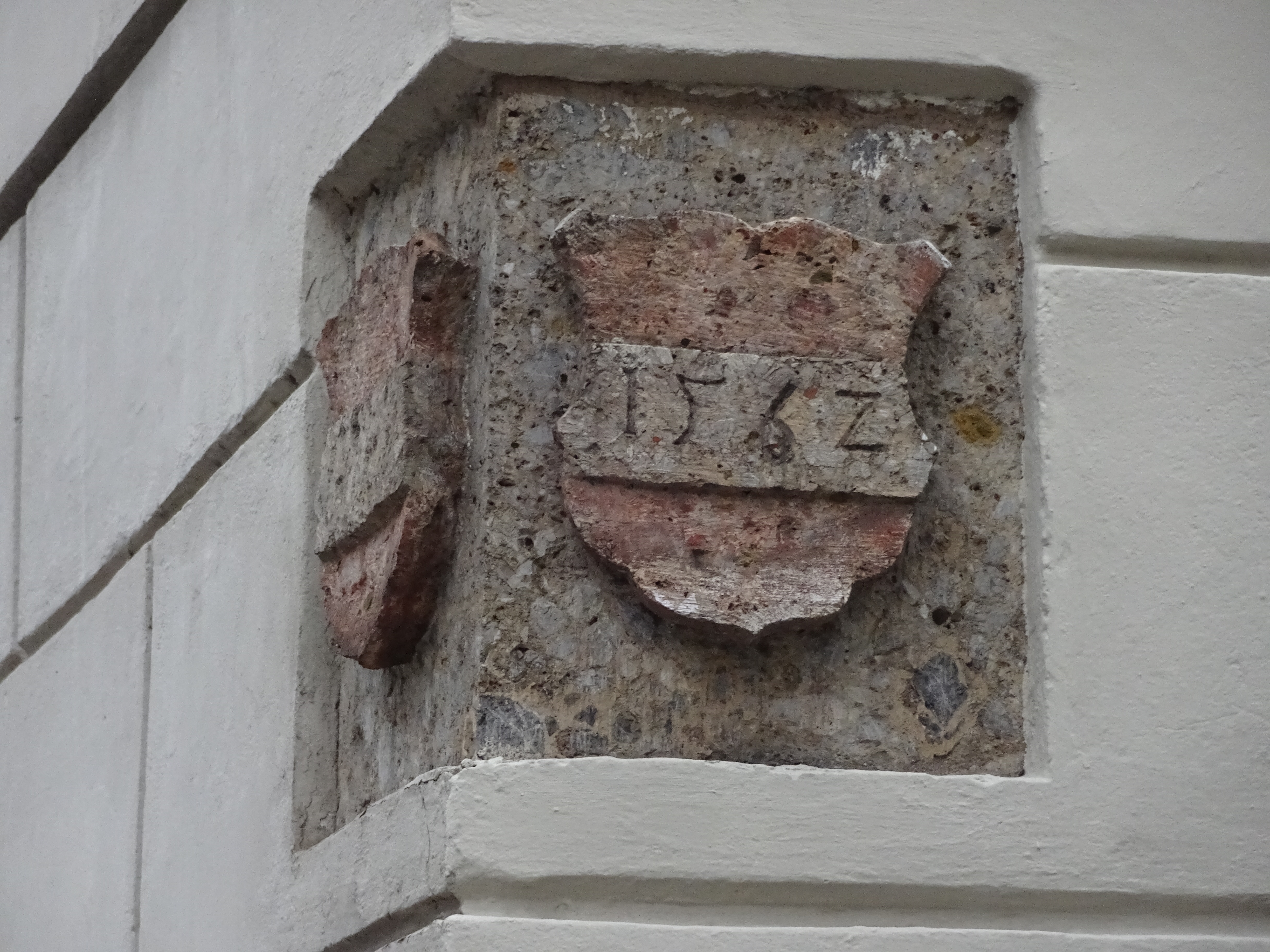 Wappenstein mit Bindenschild und Inschrift "1562" (Gründung des Jesuitenkollegs) am ehem. Jeusitenkolleg (heute Theologische Fakultät), Innsbruck, Ecke Universitätsstraße/Angerzellgasse This media shows the remarkable cultural object in the Austrian state of Tyrol listed by the Tyrolean Art Cadastre with the ID 35780. (on tirisMaps, pdf, more images on Commons)